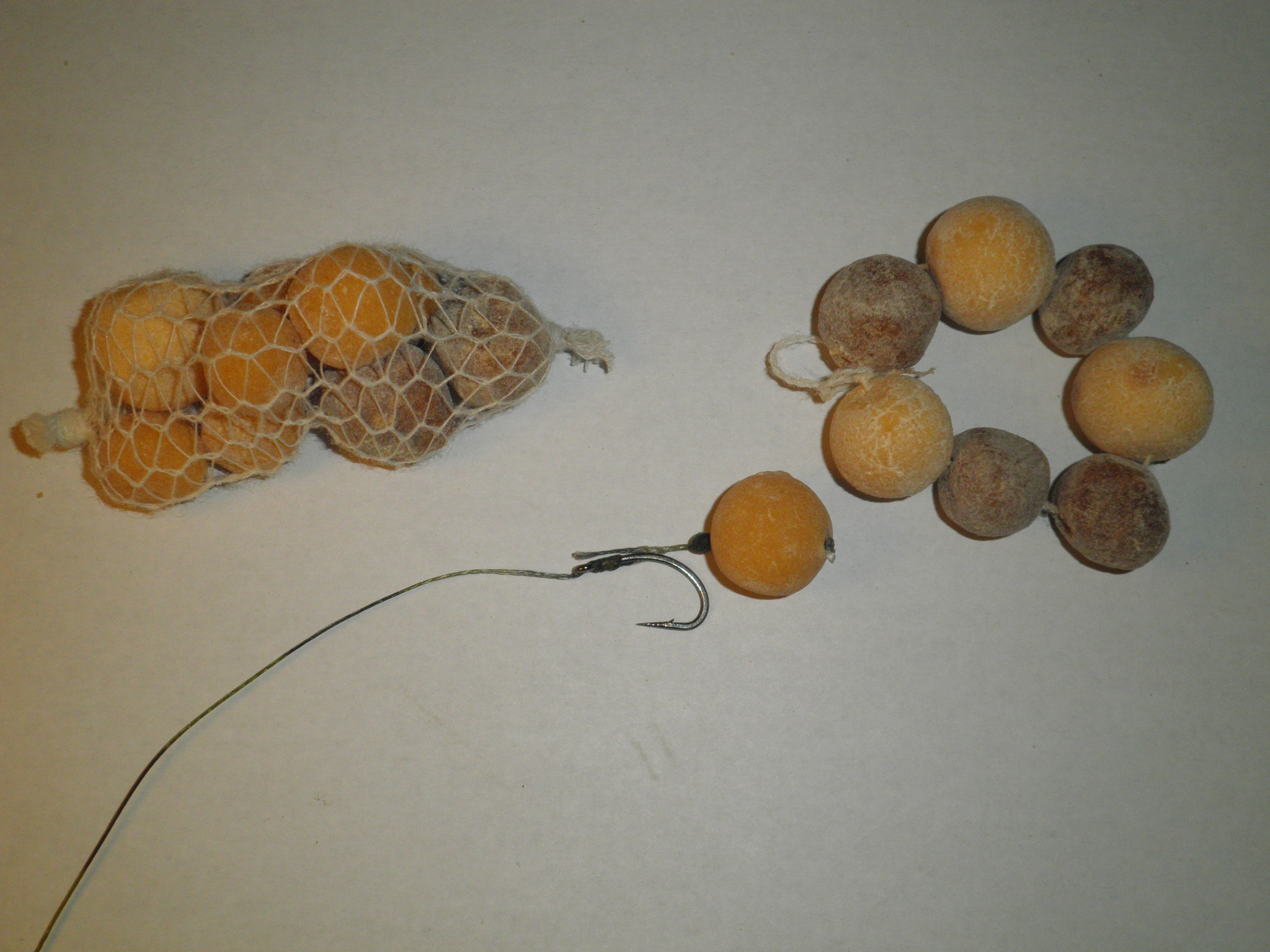 Використання бойлів. Бойли в ПВА та на волосі.